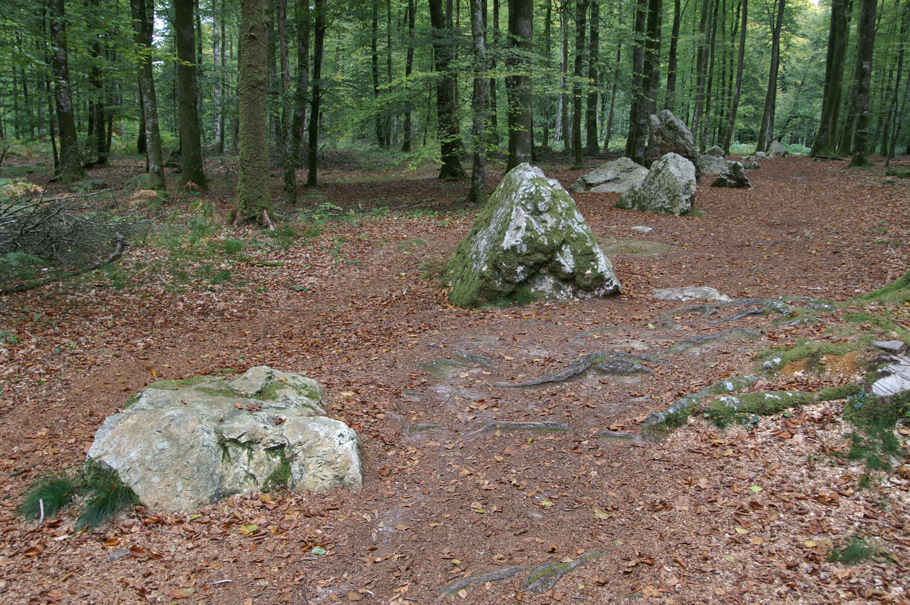 Alignement du Cordon des Druides à Landéan, dans la forêt de Fougères.